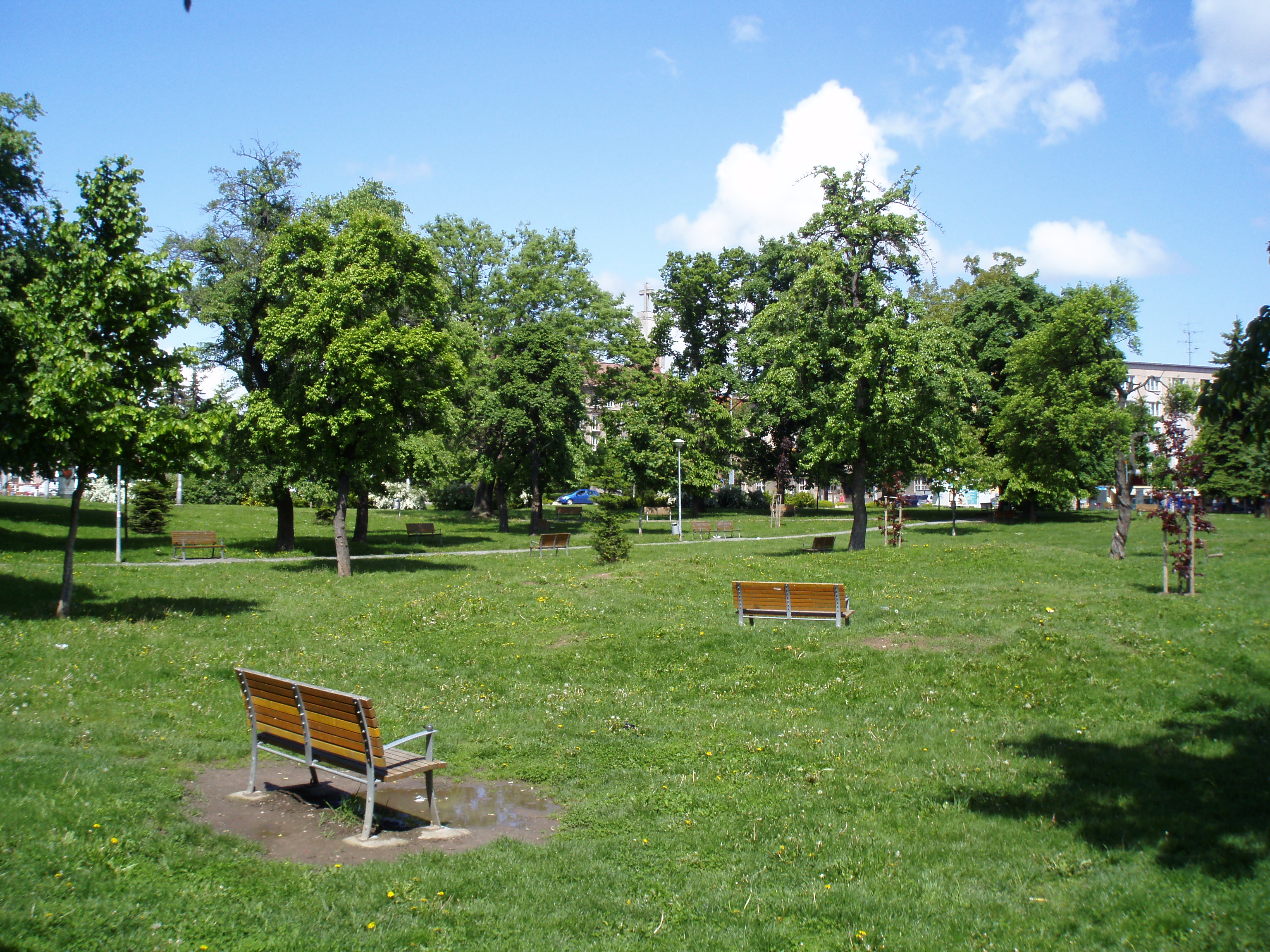 Sukovy sady, původně Fialovy sady (podle obecního starosty, zakladatele okrašlovacího spolku a iniciátora vzniku parku)